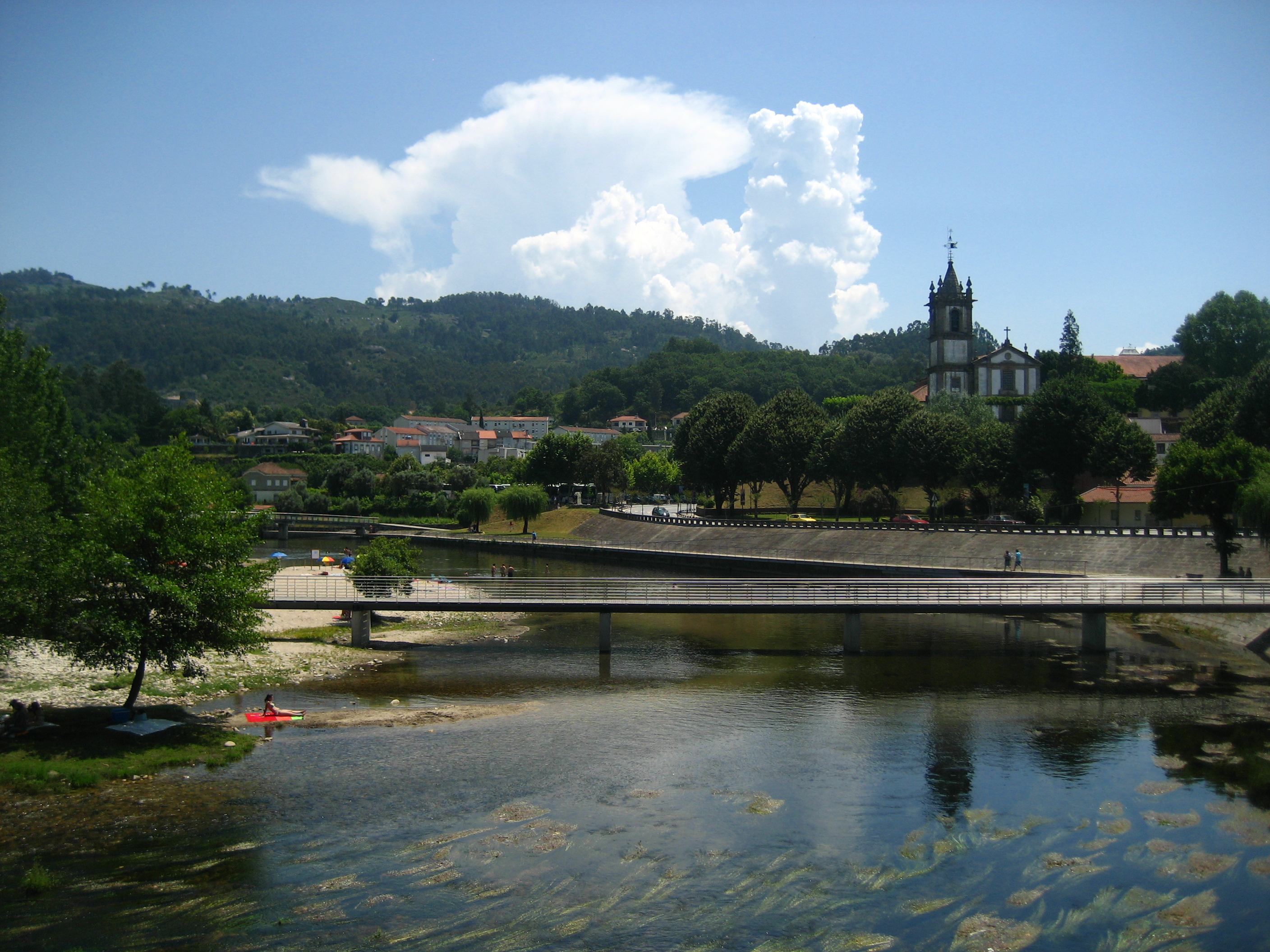 Rio Vez et l'église Do Espirito Santo, , Arcos de Valdevez,Portugal